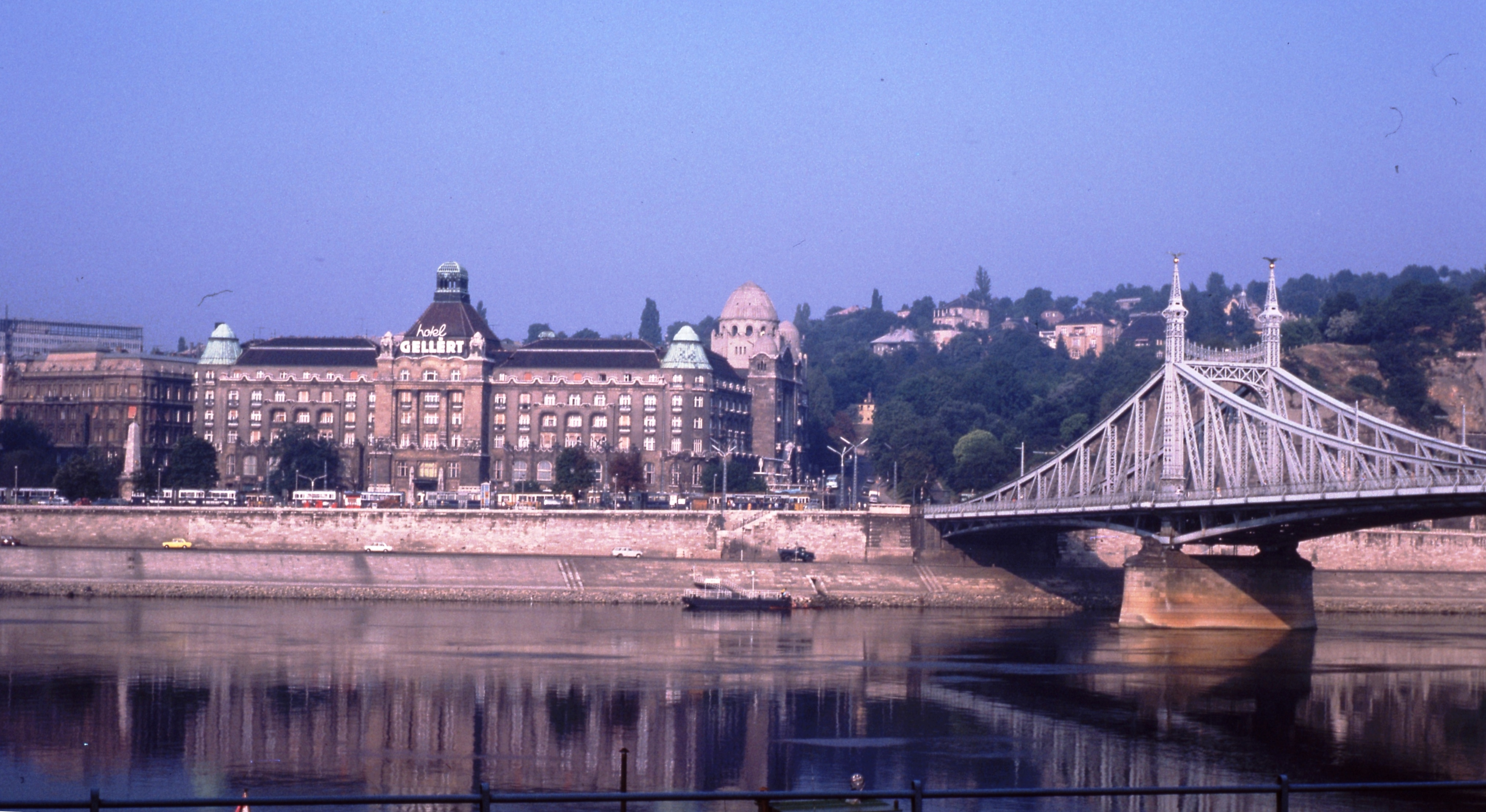 Hotel Gellert and Bridge in Budapest